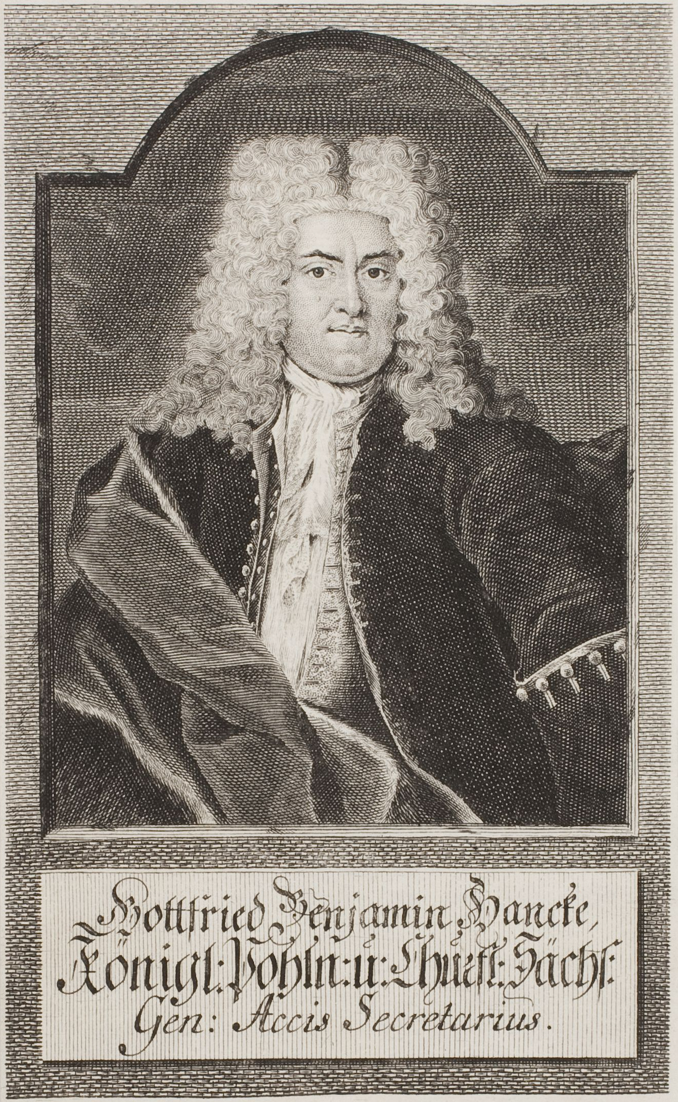 Bildnis Gottfried Benjamin Hancke; Wolfenbüttel, Herzog August Bibliothek, Inventar-Nr. A 8792; Frontispiz zu: Hancke, Gottfried Benjamin, Gedichte, Erster Theil. Nebst denen Neukirchischen Satyren. Zweyte und vermehrte Auflage, 1731, Dresden, bei: in Verlegung des Autoris; [HAB: Lo 2577]